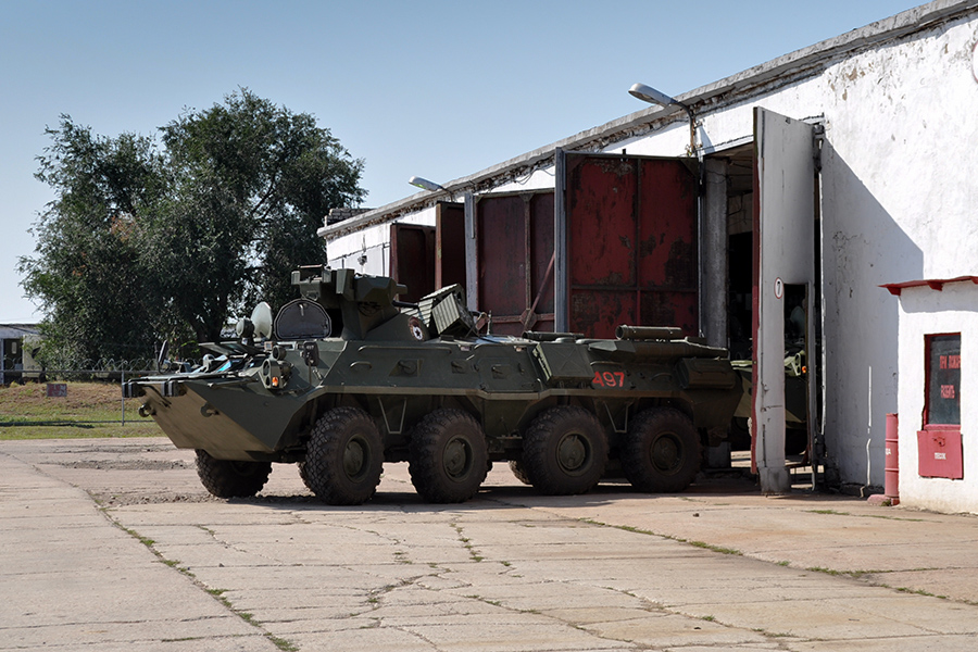 Приведение в полную степень боевой готовности 23-й отдельной гвардейской мотострелковой бригады ЦВО, задействованной во внезапной проверке боеготовности (г. Самара)